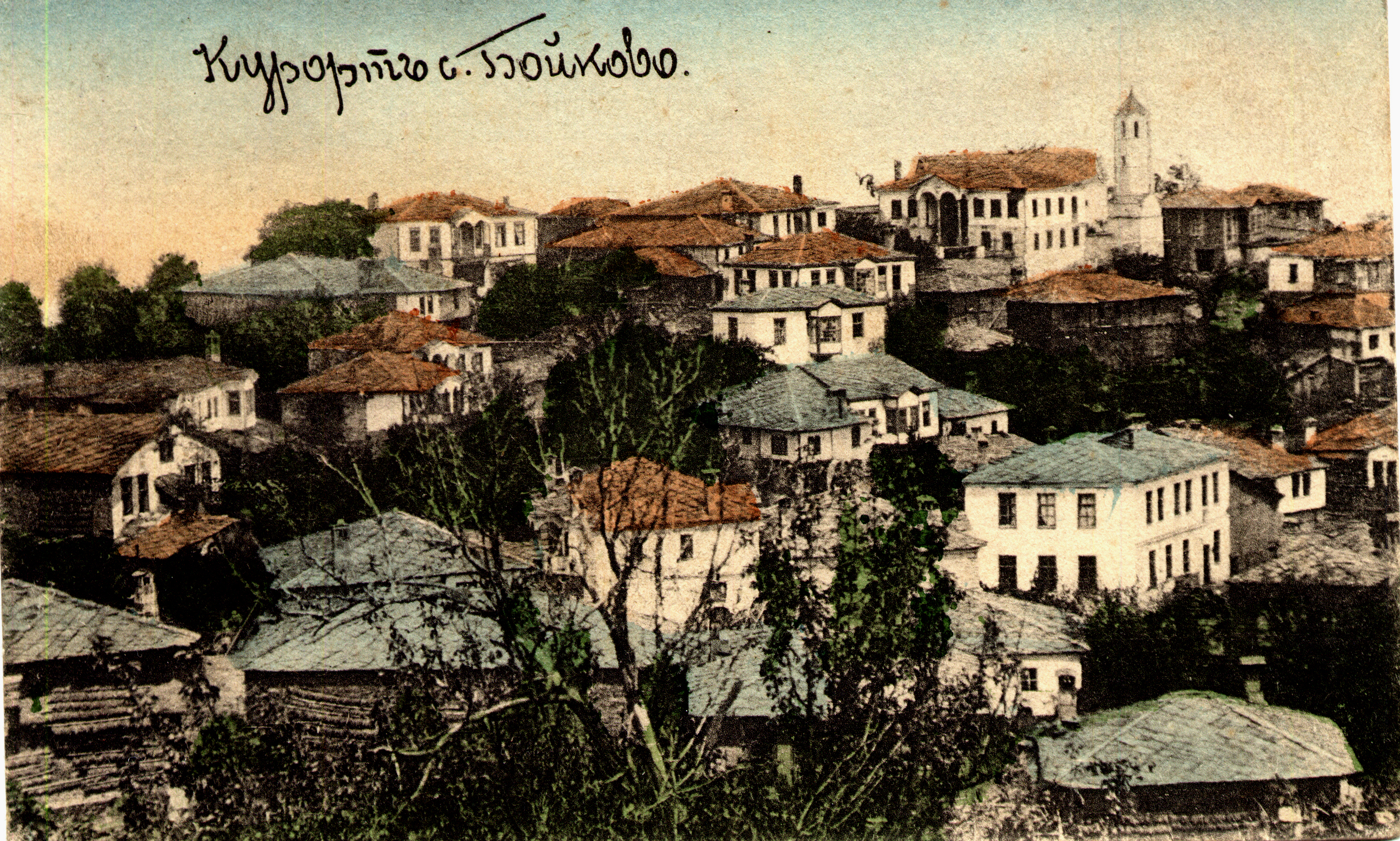 Снимка на Бойково от началото на ХХ век